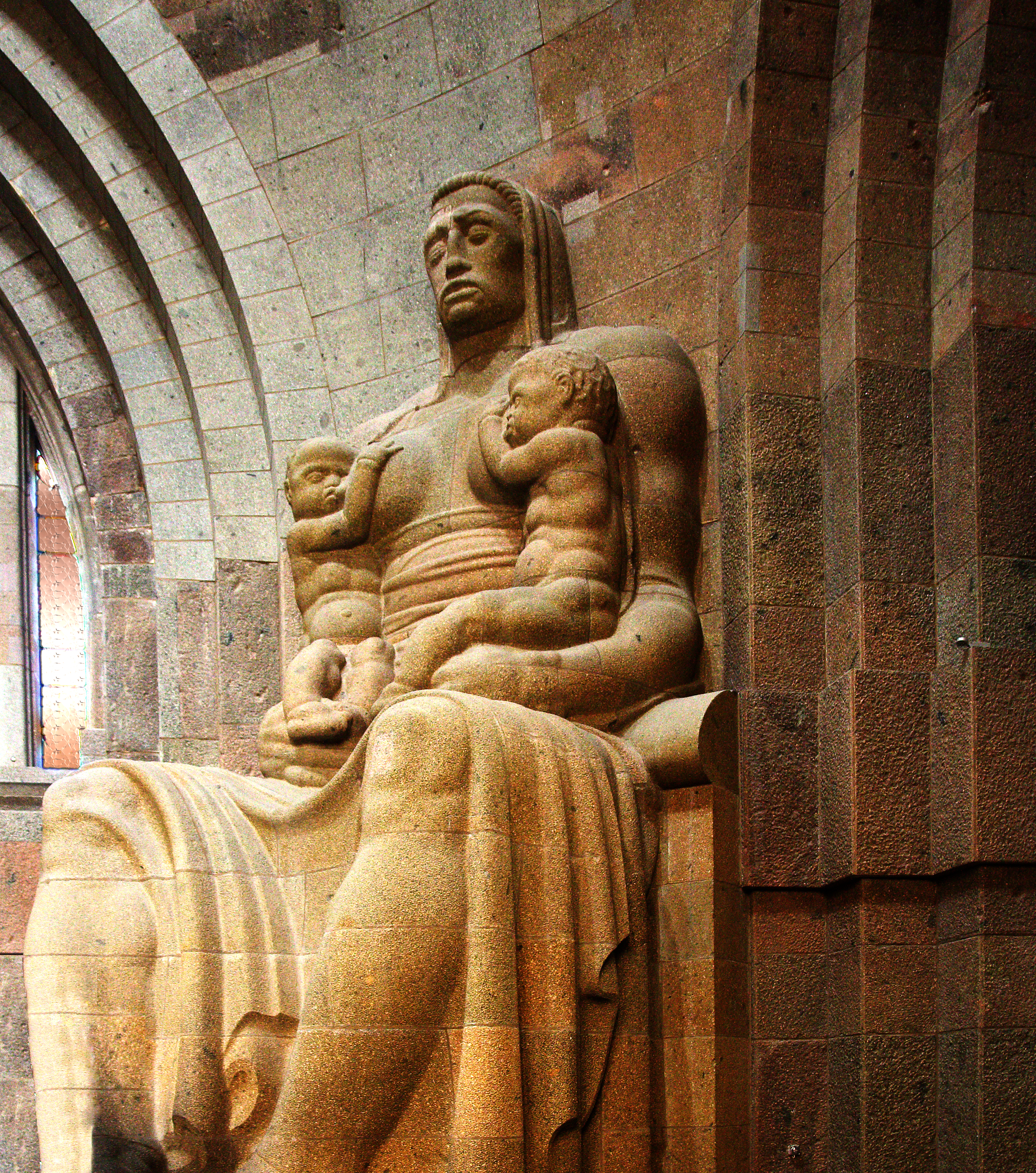 oberhalb der Krypta eine von mehreren Figuren